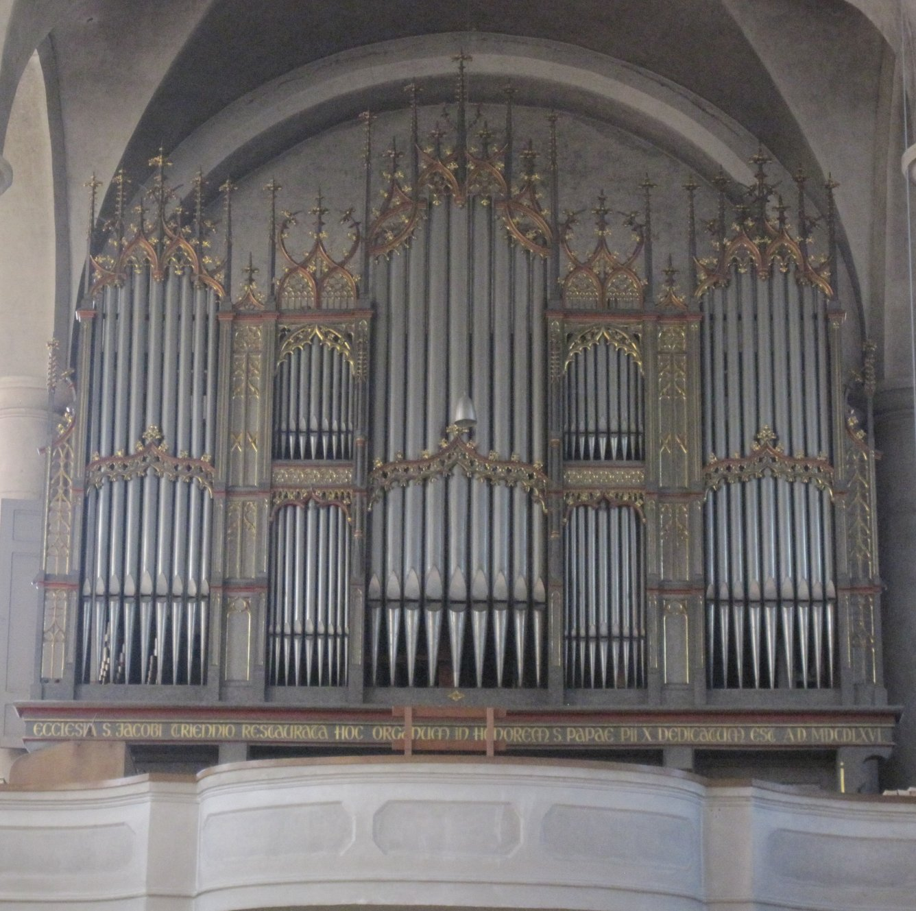 Orgel der St. Jakobskirche in Straubing von Friedrich Meier (1964/67)